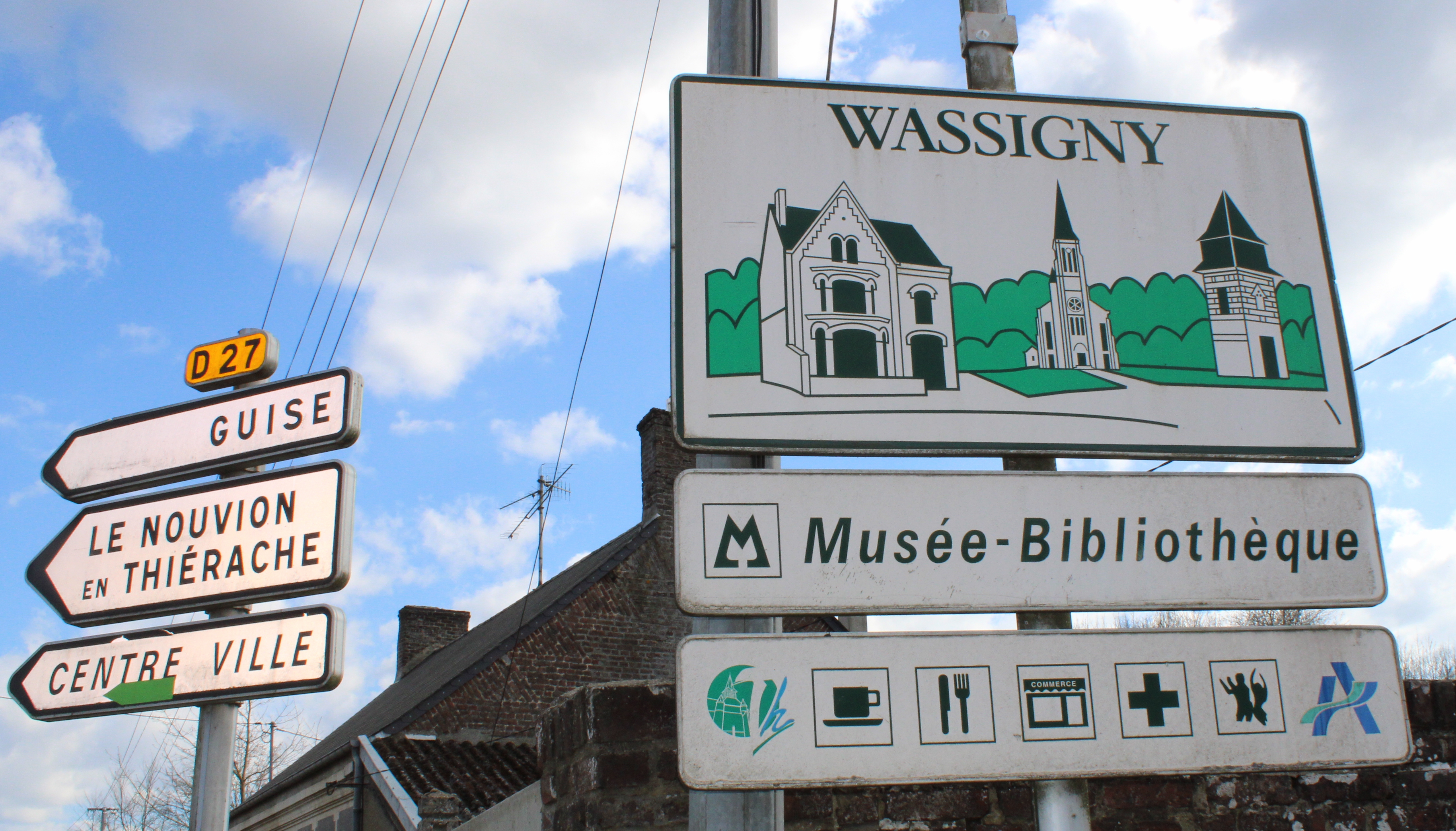 Panneau d'information touristique